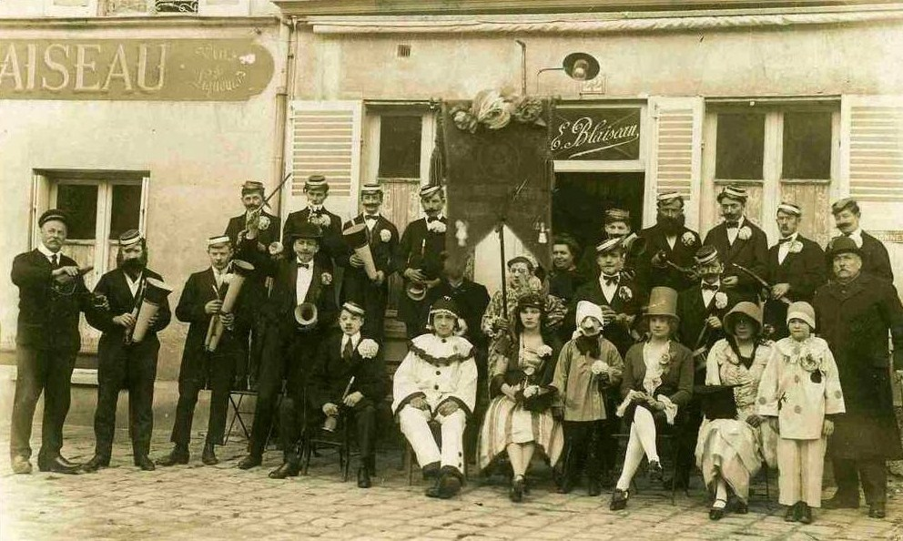 Les bigotphonistes de la Commune libre de Milly-la-Forêt en 1925.